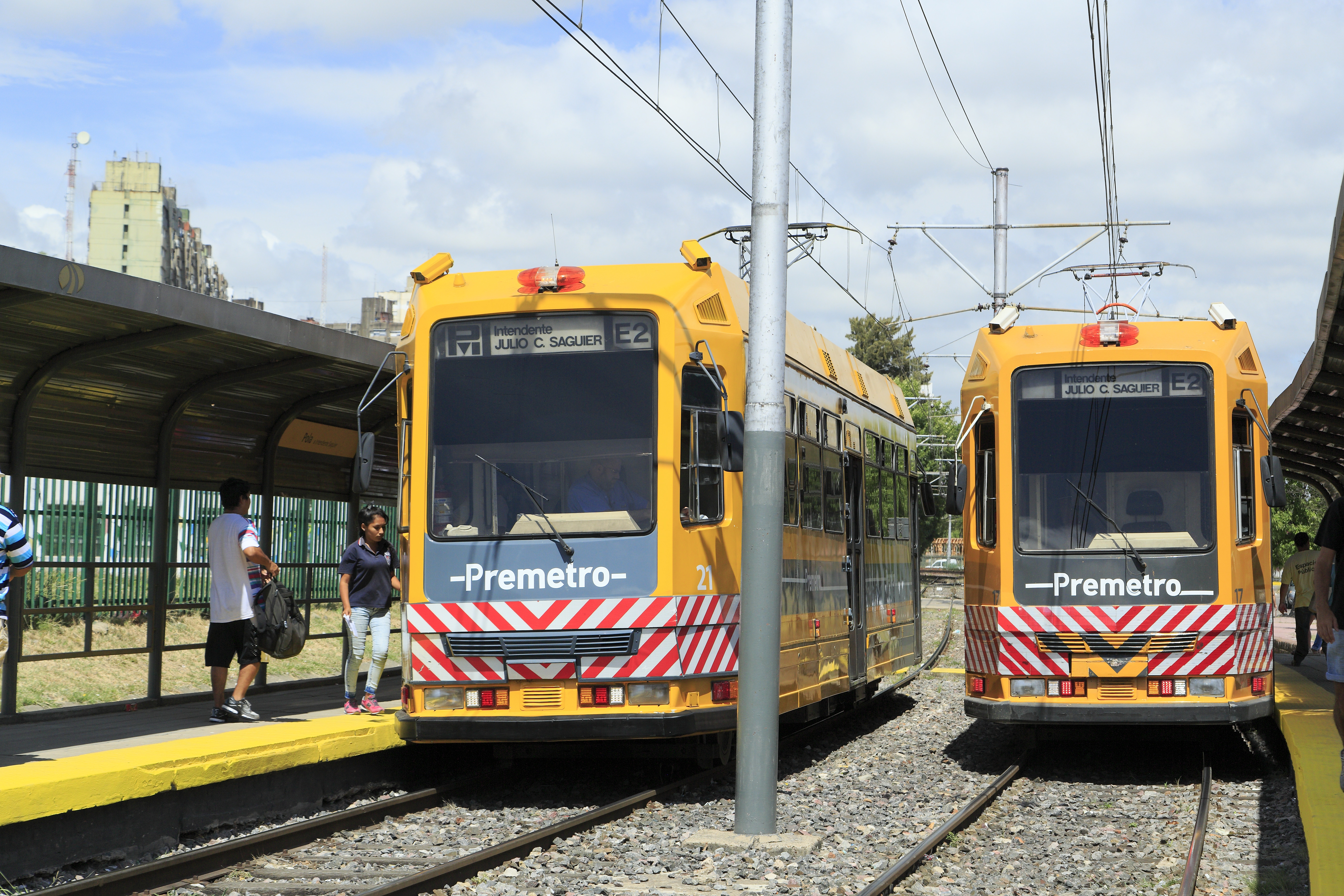 Zugbegegnung, der Triebwagen 17 rechts fährt zum Centro Cívico. Wegen der Gleisführung wird aus der einfachen Zugbegegnung in diesem Fall eine echte Kreuzung, der Fahrweg zum Centro Cívico Lugano führt über das linke Streckengleis. Die Zielfilmanzeige am jeweils hinteren Wagenende wird in der Regel nicht umgestellt.